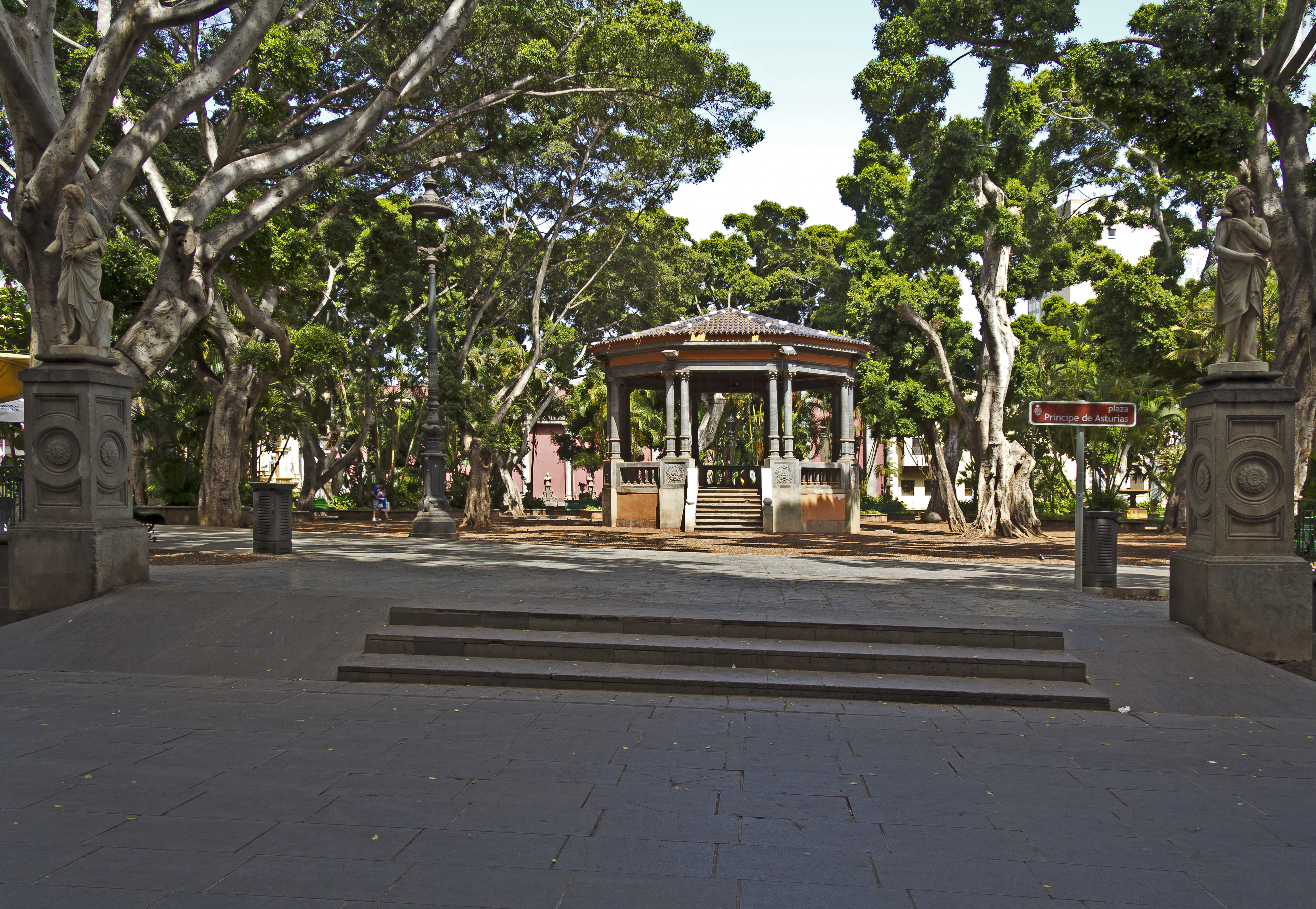 Die Plaza del Príncipe de Asturias in Santa Cruz de Tenerife wurde auf dem Gelände des Gartens des im Jahr 1820 säkularisierten Franziskanerklosters angelegt.